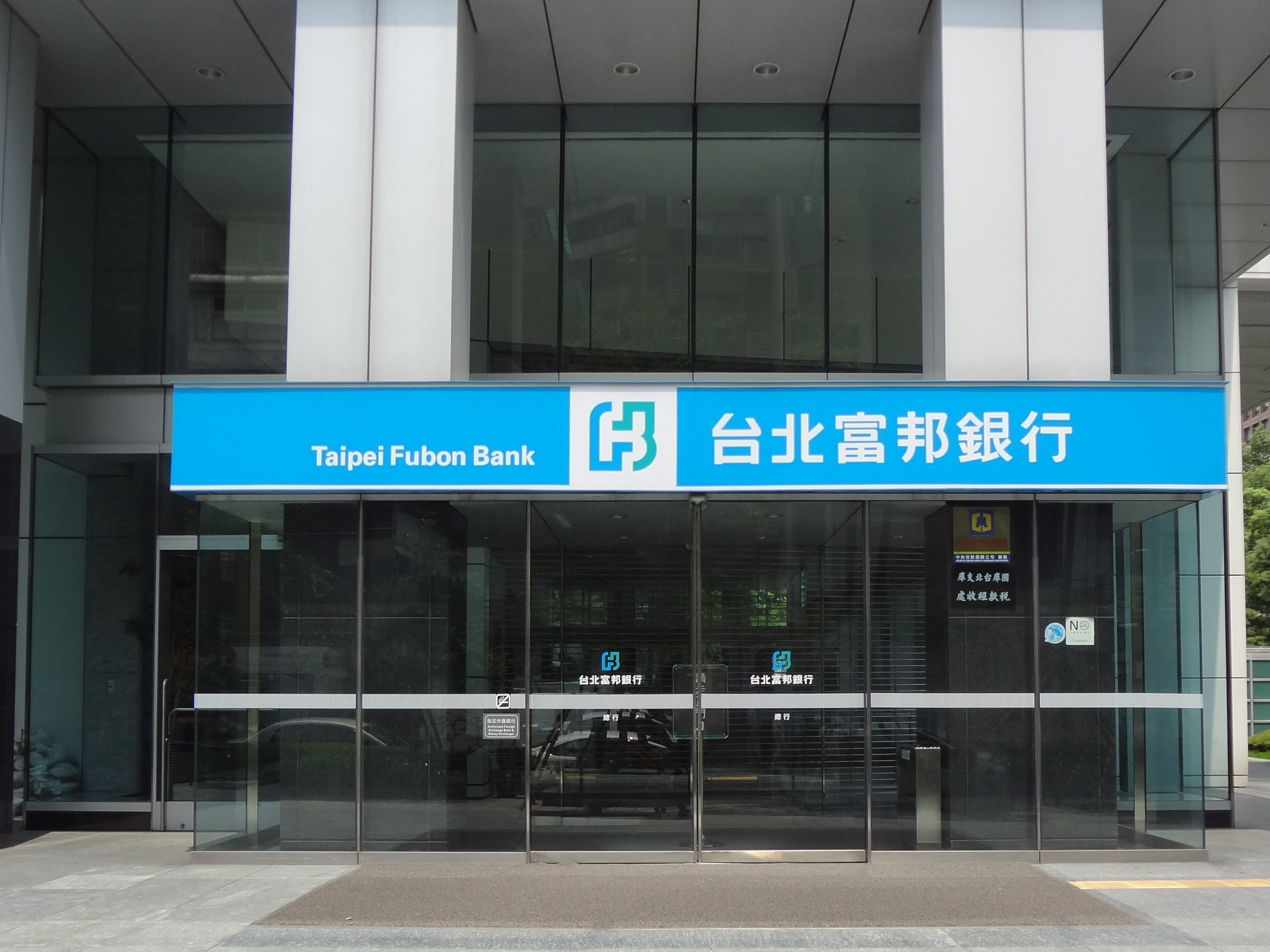 台北富邦銀行總行，位於臺北市大安區仁愛路四段169號1樓（富邦金融中心）。